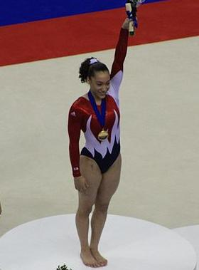 A ginasta campeã mundial do salto sobre a mesa 2009, Kayla Williams